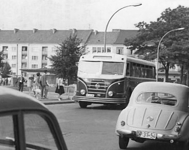 Zentralbild-Brüggmann Co. 16.8.1962 Aus dem Alltag von Potsdam UBz., Am Platz der Einheit. In der während des 2. Weltkrieges durch anglo-amerikanische Bombenangriffe stark zerstörten Stadt sind in den vergangenen Jahren neue Häuserblocks entstanden.